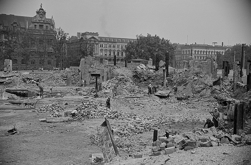 Original image description from the Deutsche FotothekTrümmerbeseitigung